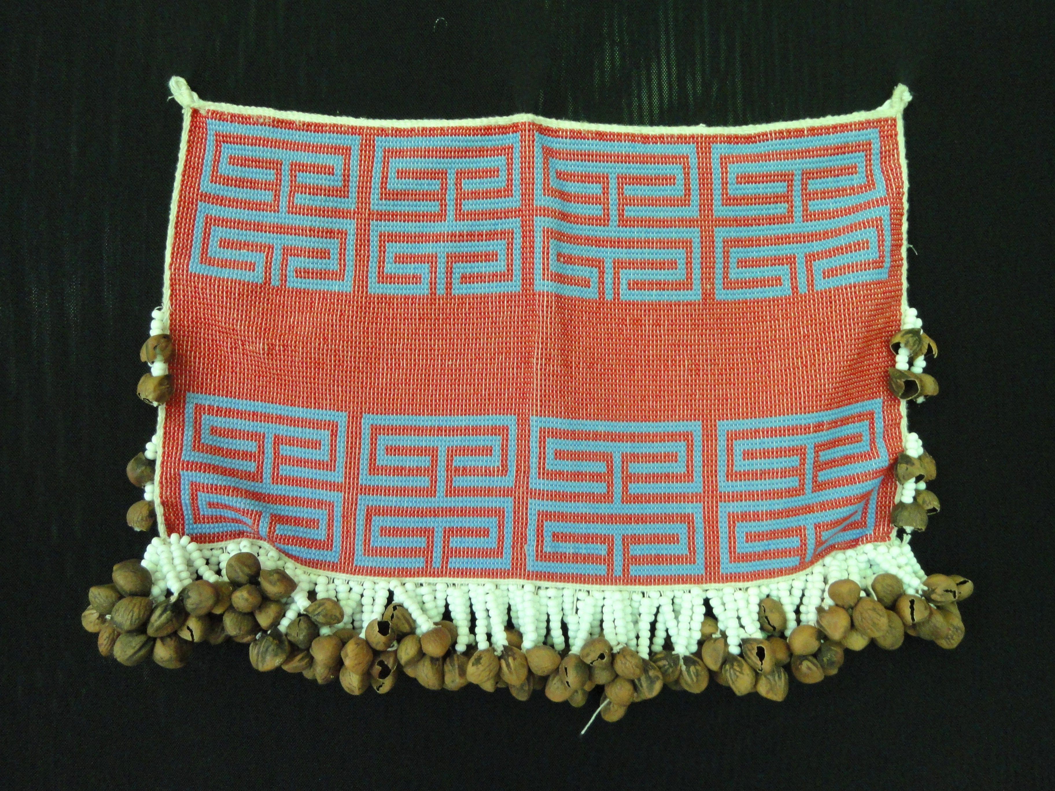 Exhibit in the Memorial dos Povos Indígenas, Brasília, Brazil.